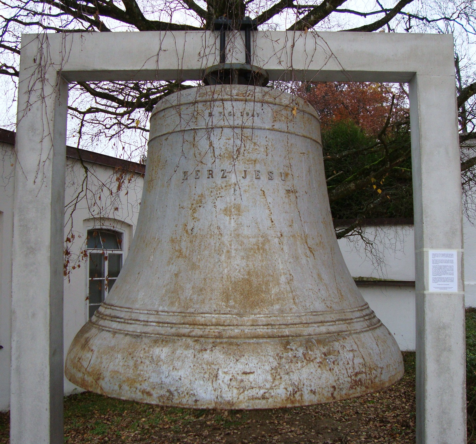 Abteikirche Scheyern: Große Gussstahlglocke (1947, g0) des alten Geläuts.